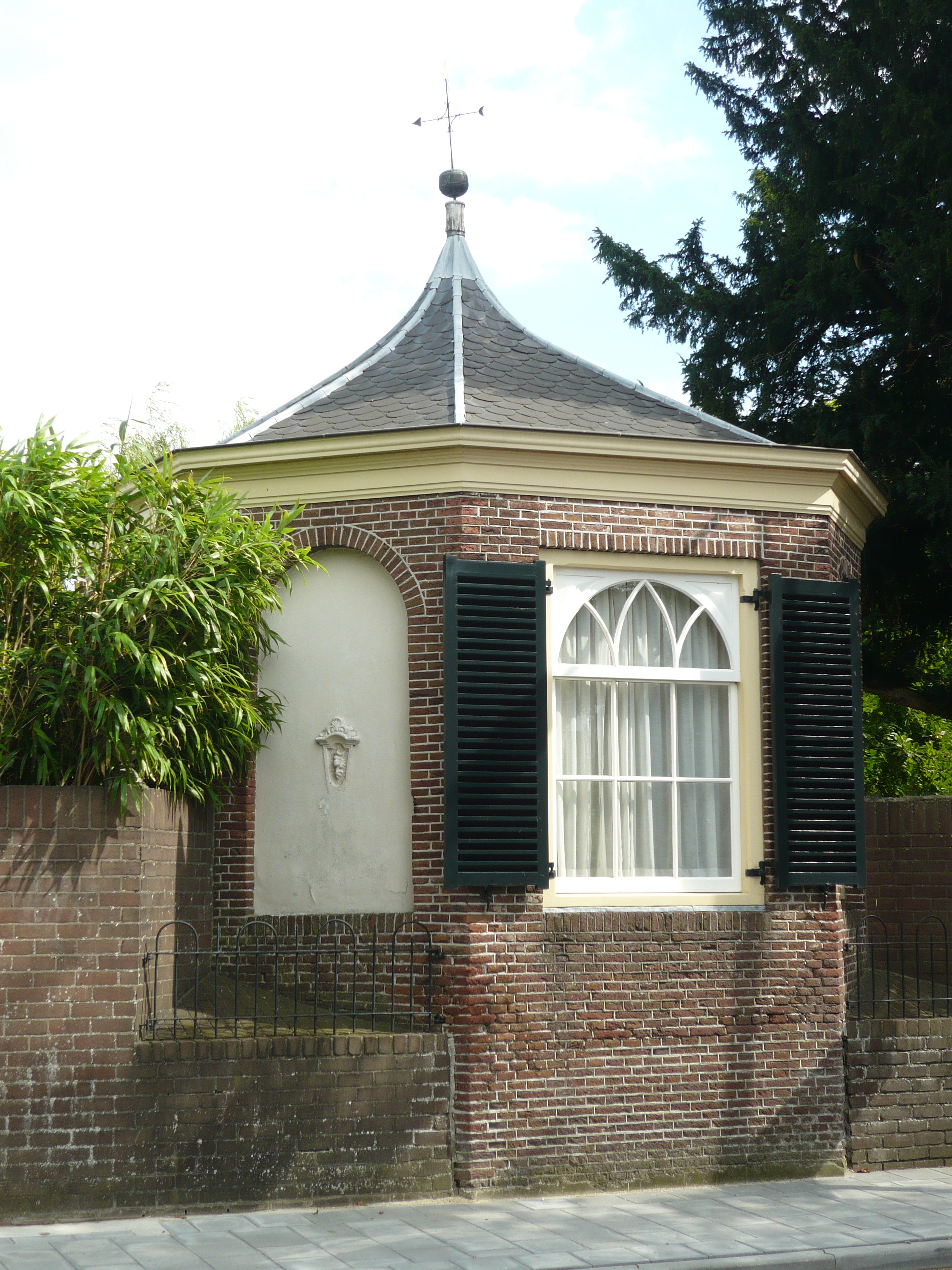 Theekoepel Hazenburg te Maarssen Binnenweg 60 33″ N, 5° 02′ 41.1″ E